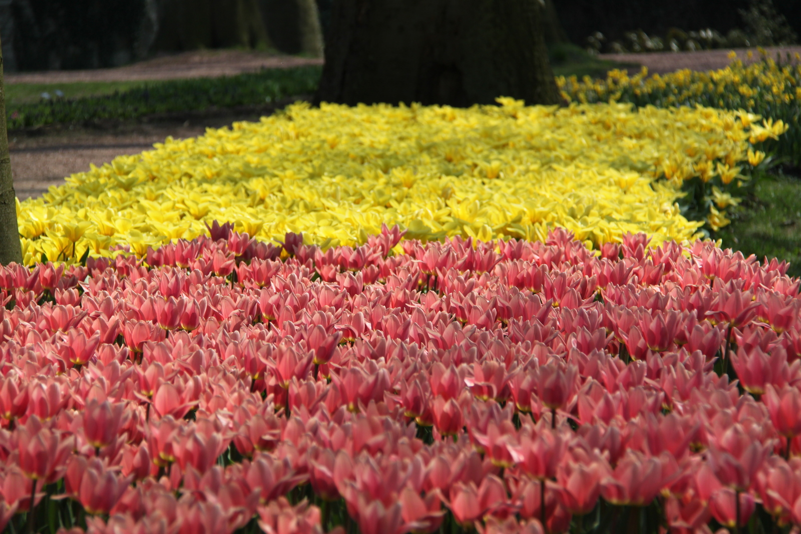 Flower Festival at Groot-Bijgaarden castle